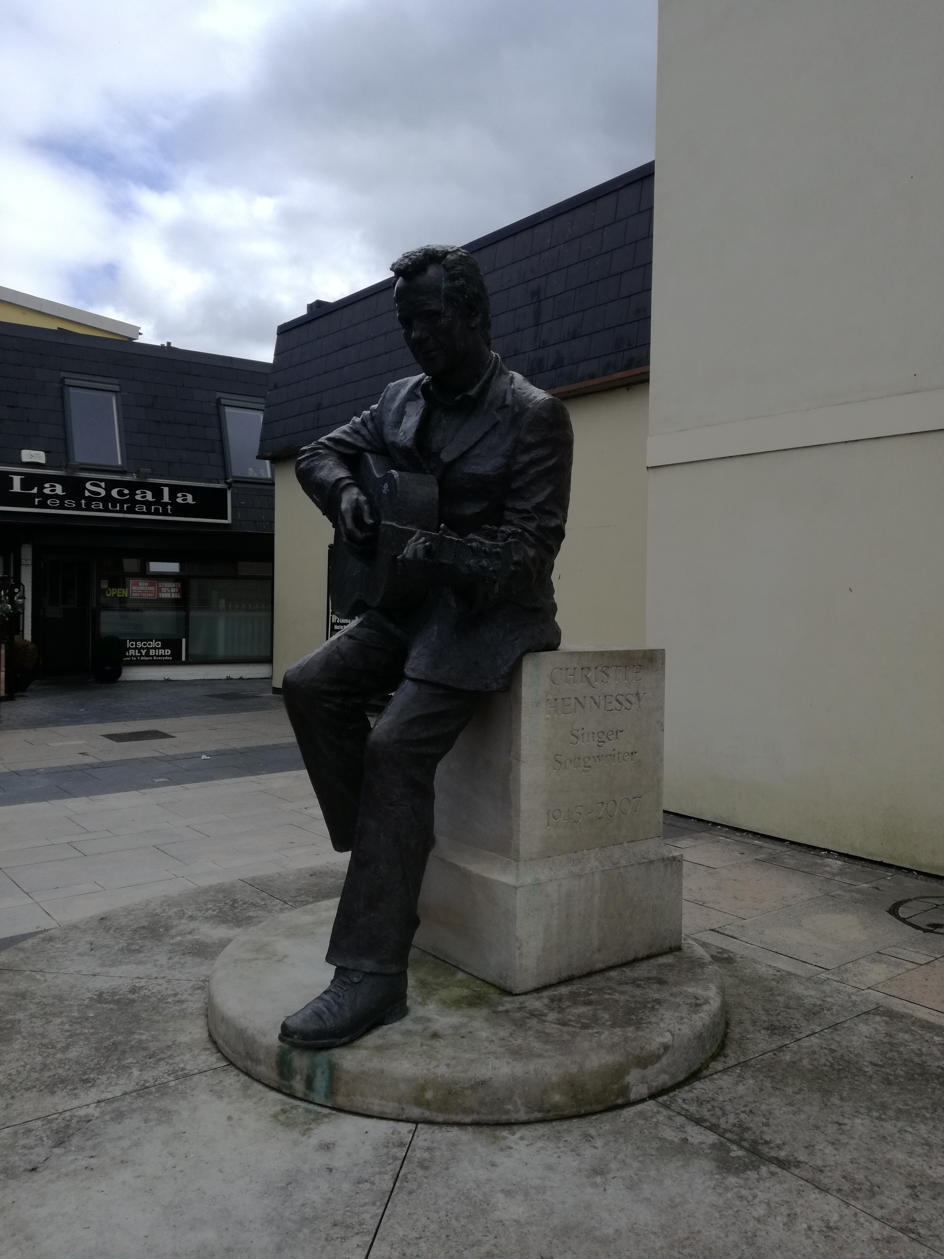 Statua a Tralee del cantante Christie Hennessy